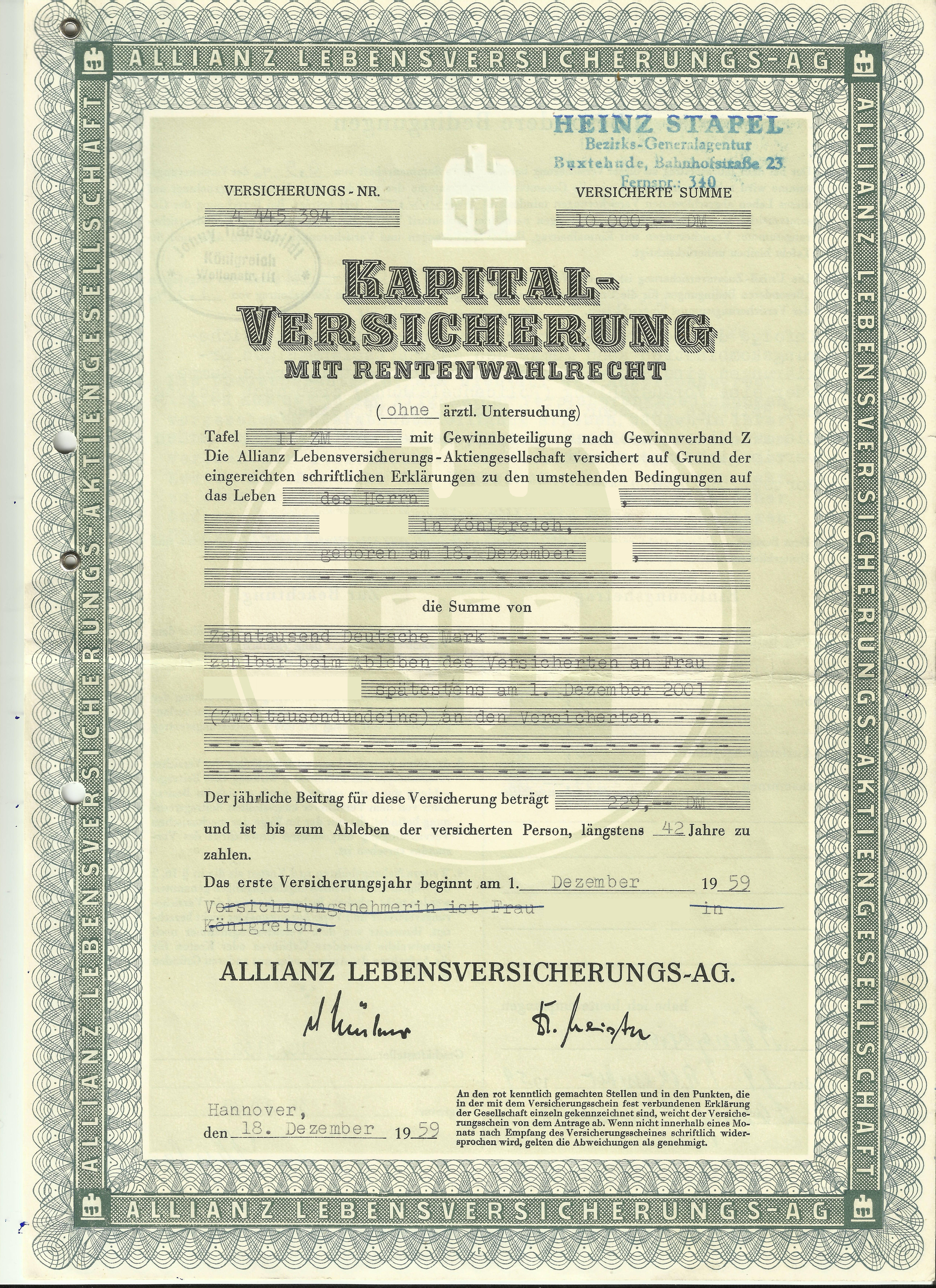 Vertrag einer Kapital-Versicherung mit Rentenwahlrecht aus dem Jahr 1959 zu jährlich 229 DM bei der Allianz